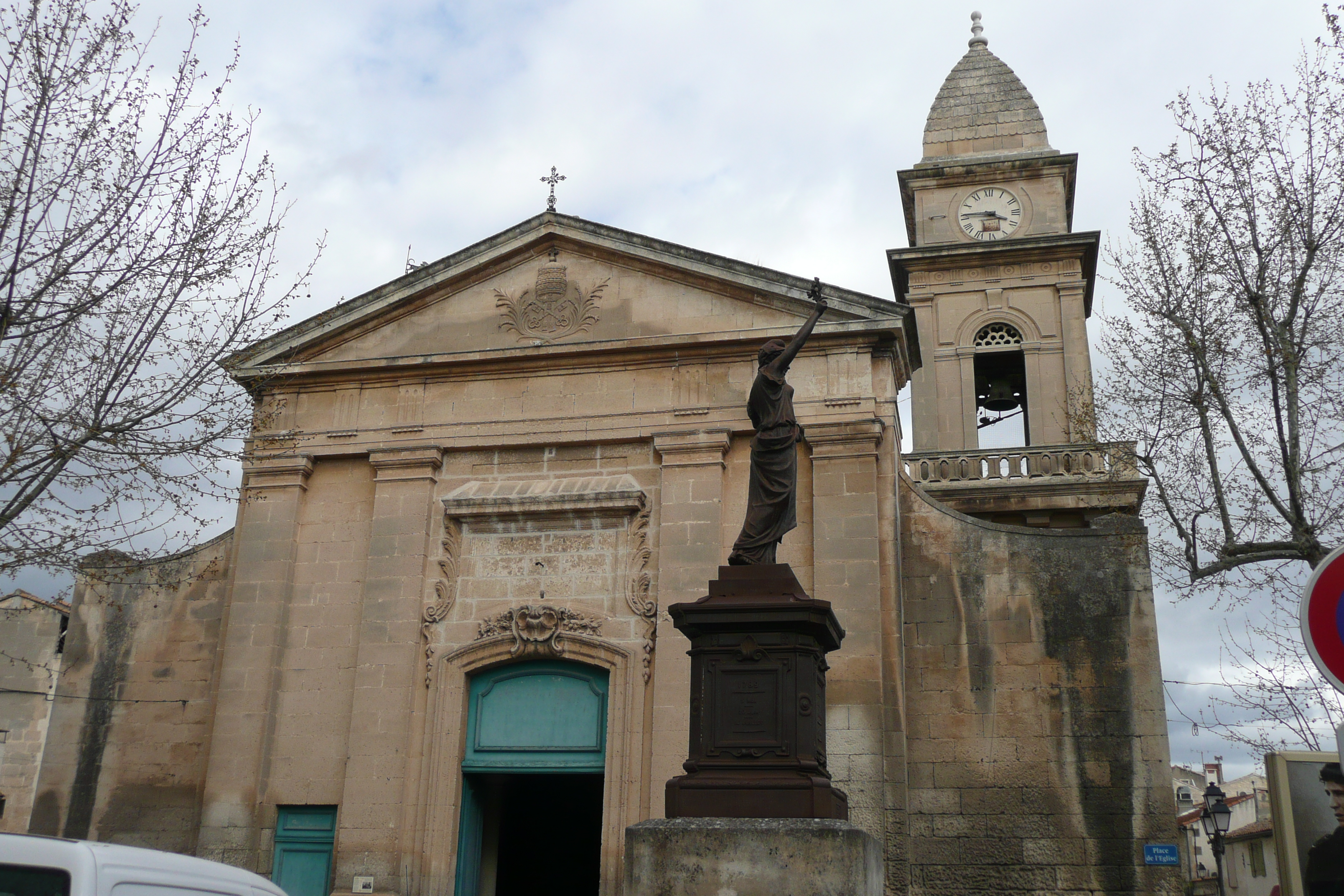 43°43′34.6″N 4°42′34.3″E / 43.726278°N 4.709528°E